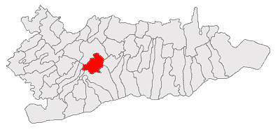 Categorie:Hărţi ale judeţului Călăraşi